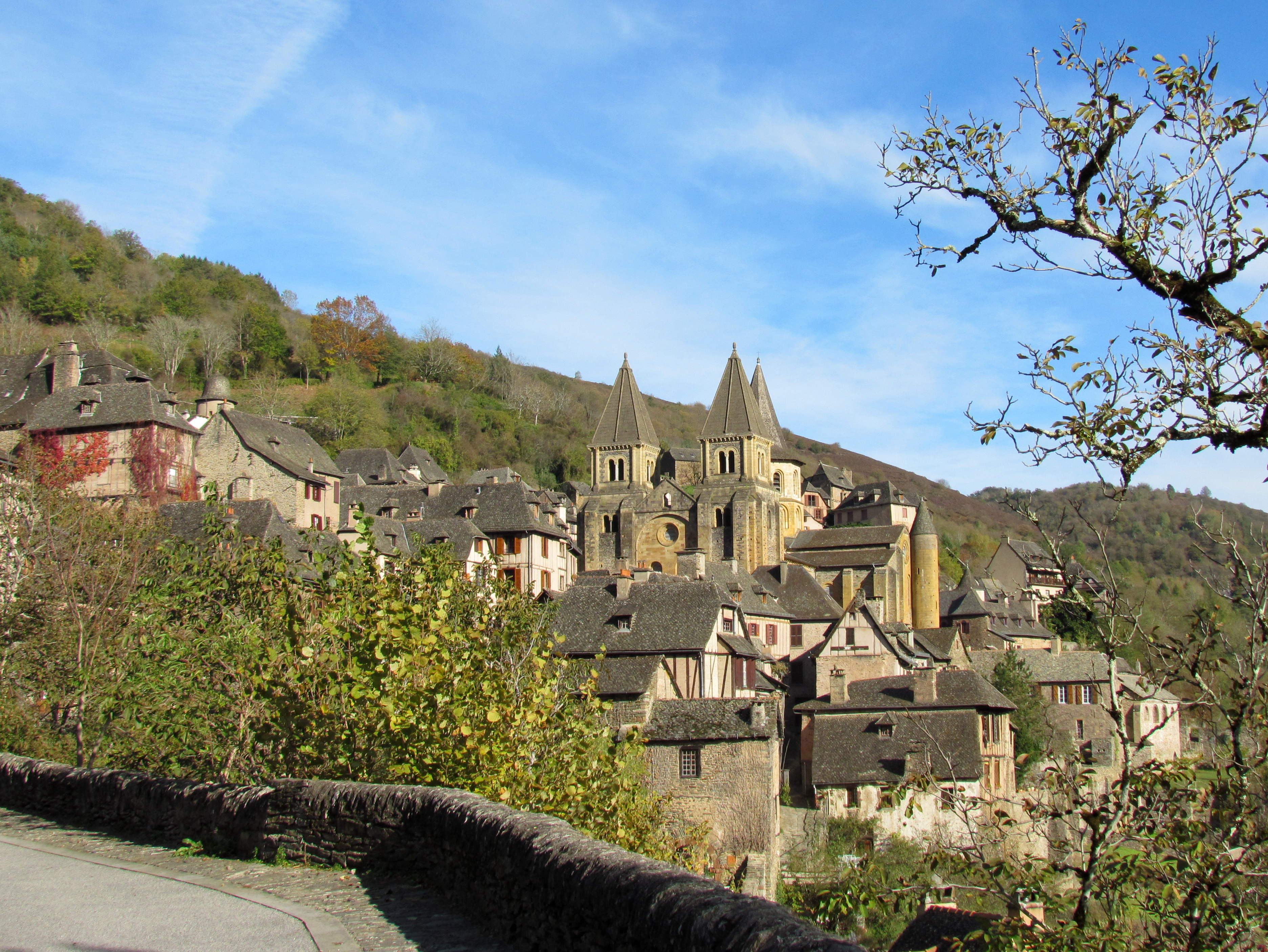 Village de Conques en Aveyron (12) .